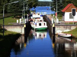 Schleuse vor der Mündung der Woblitz in die Havel beim Kloster Himmelpfort. Quelle: selbst fotografiert Fotograf: Benutzer:Exxu Datum: 2005